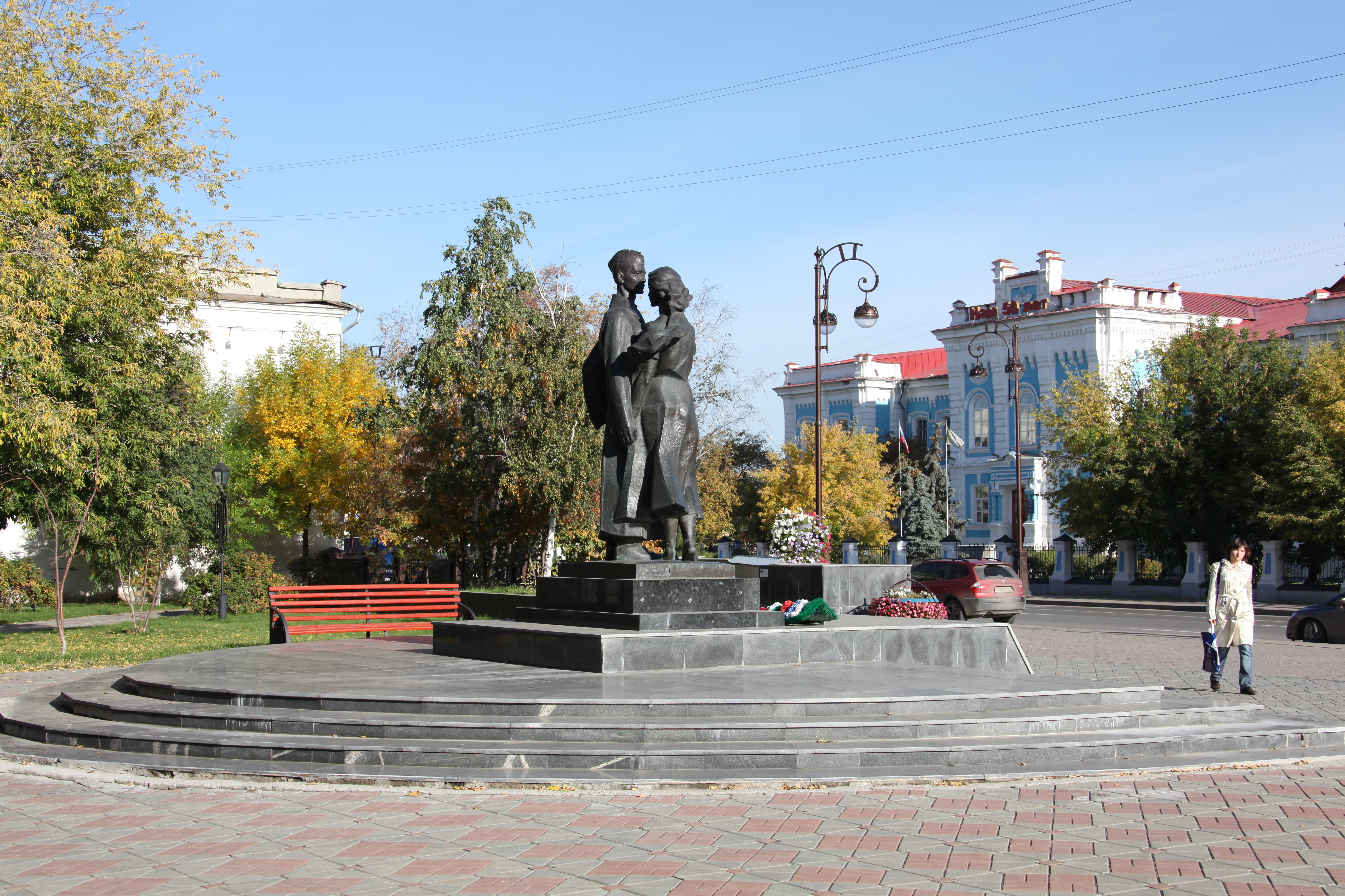 Memorialo al mezlernejanoj de Tjumeno pereintaj en la Dua mondmilito. Tjumeno, Rusio.